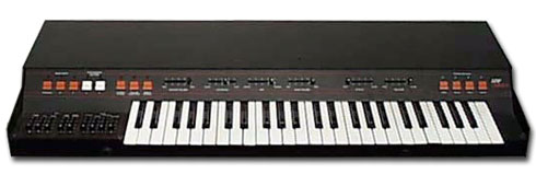 sintetizzatore ARP Omni Mk2 Licensing Categoria:Sintetizzatori Categoria:Sintetizzatori ARP